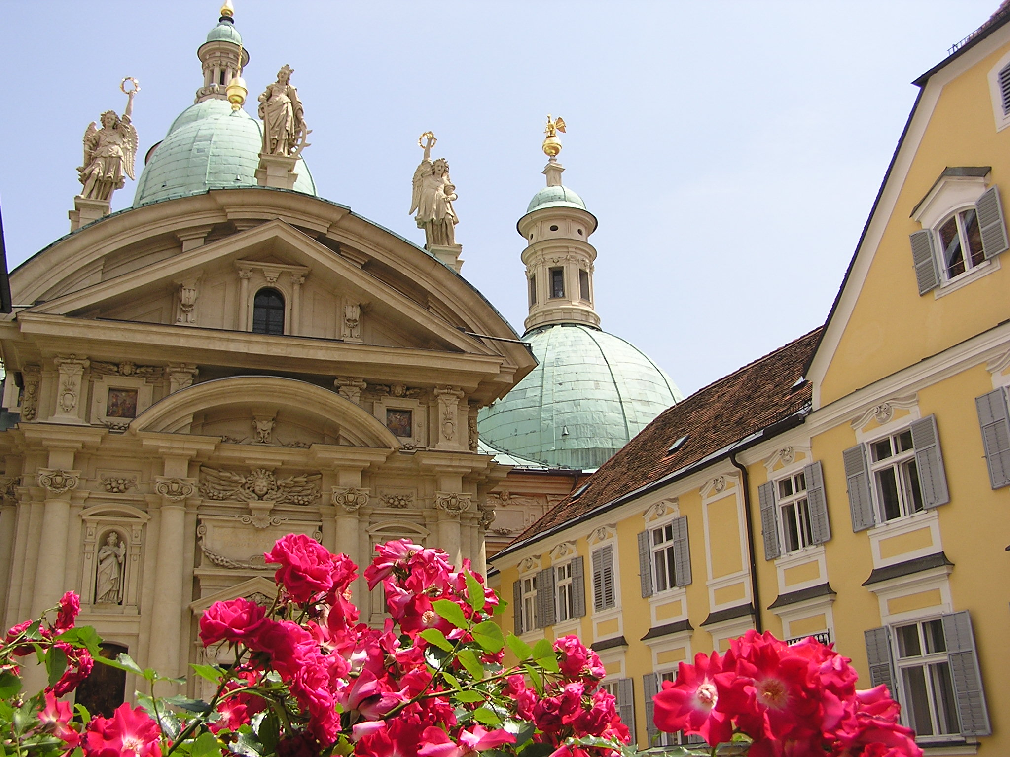 Katharinenkirche und Mausoleum